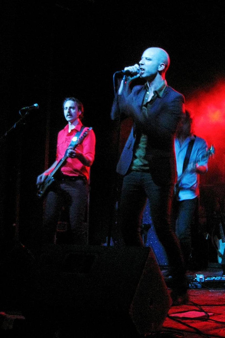 Madrugada performing at Columbia Club Berlin